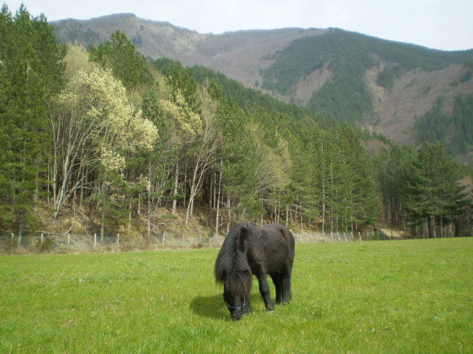 La campagna di Rincine presenta ancora diversi pascoli